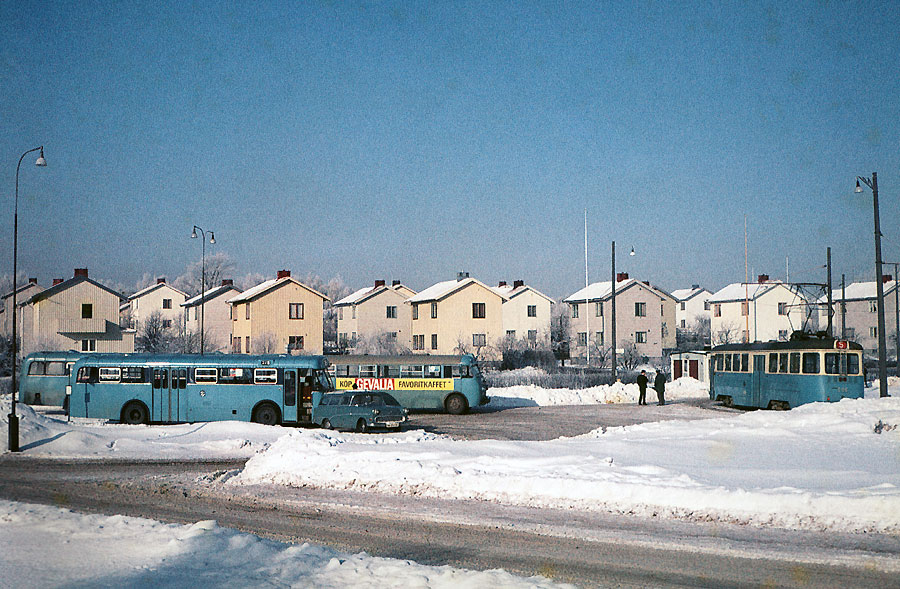 Spårvägens vändslinga i Bräcke, Göteborg 1966